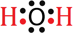 Struttura di Lewis dell'acqua.